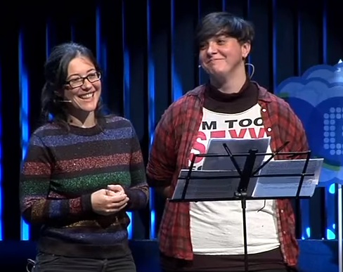 María Lado e Lucía Aldao nun dos seus recitais